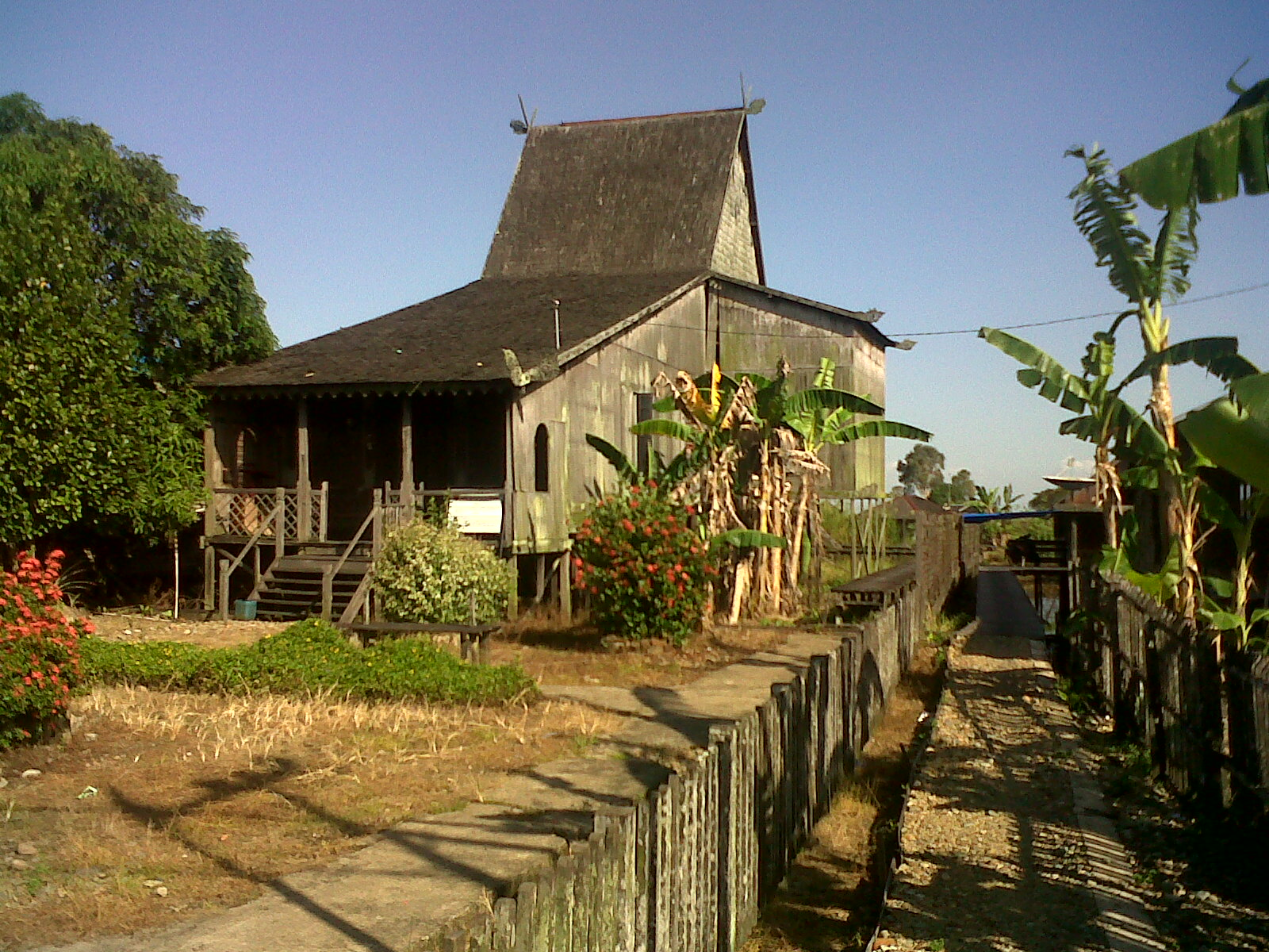 Rumah Adat Banjar Tipe Rumah Bubungan Tinggi Desa Habirau Kecamatan Daha Selatan Kabupaten Hulu Sungai Selatan